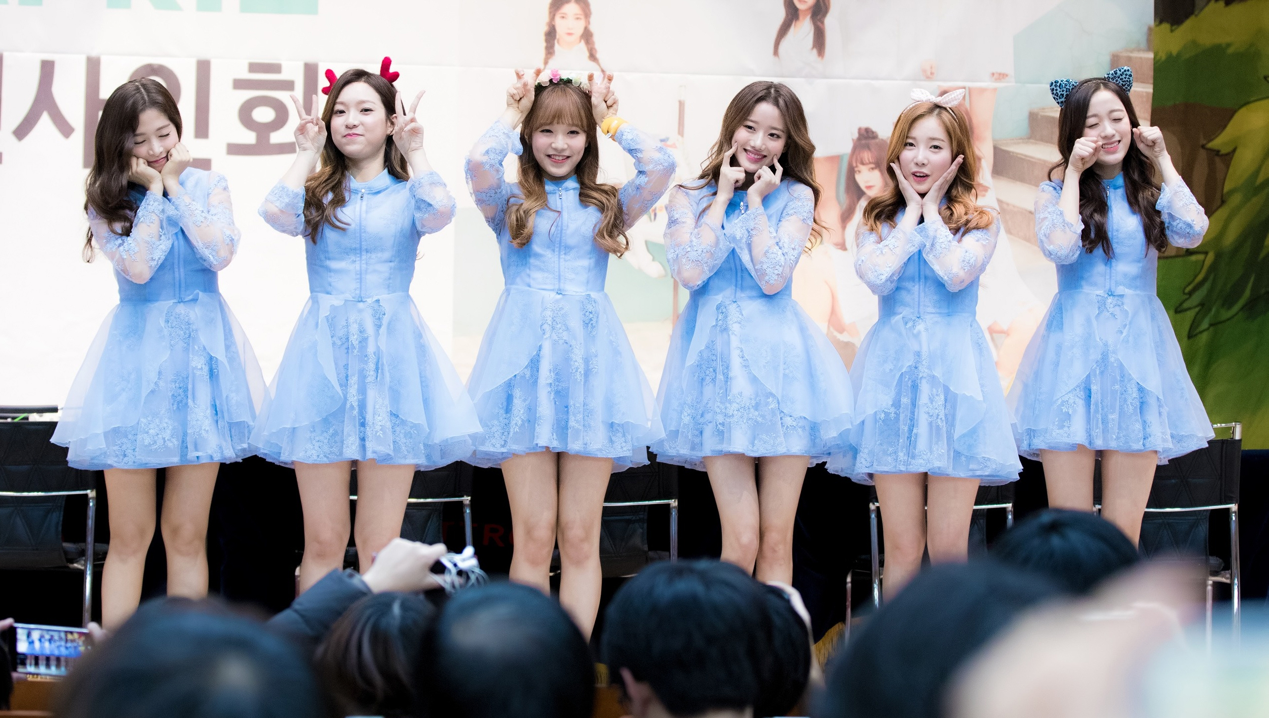 170115 목동 APRIL 팬싸인회 에이프릴 2Pic